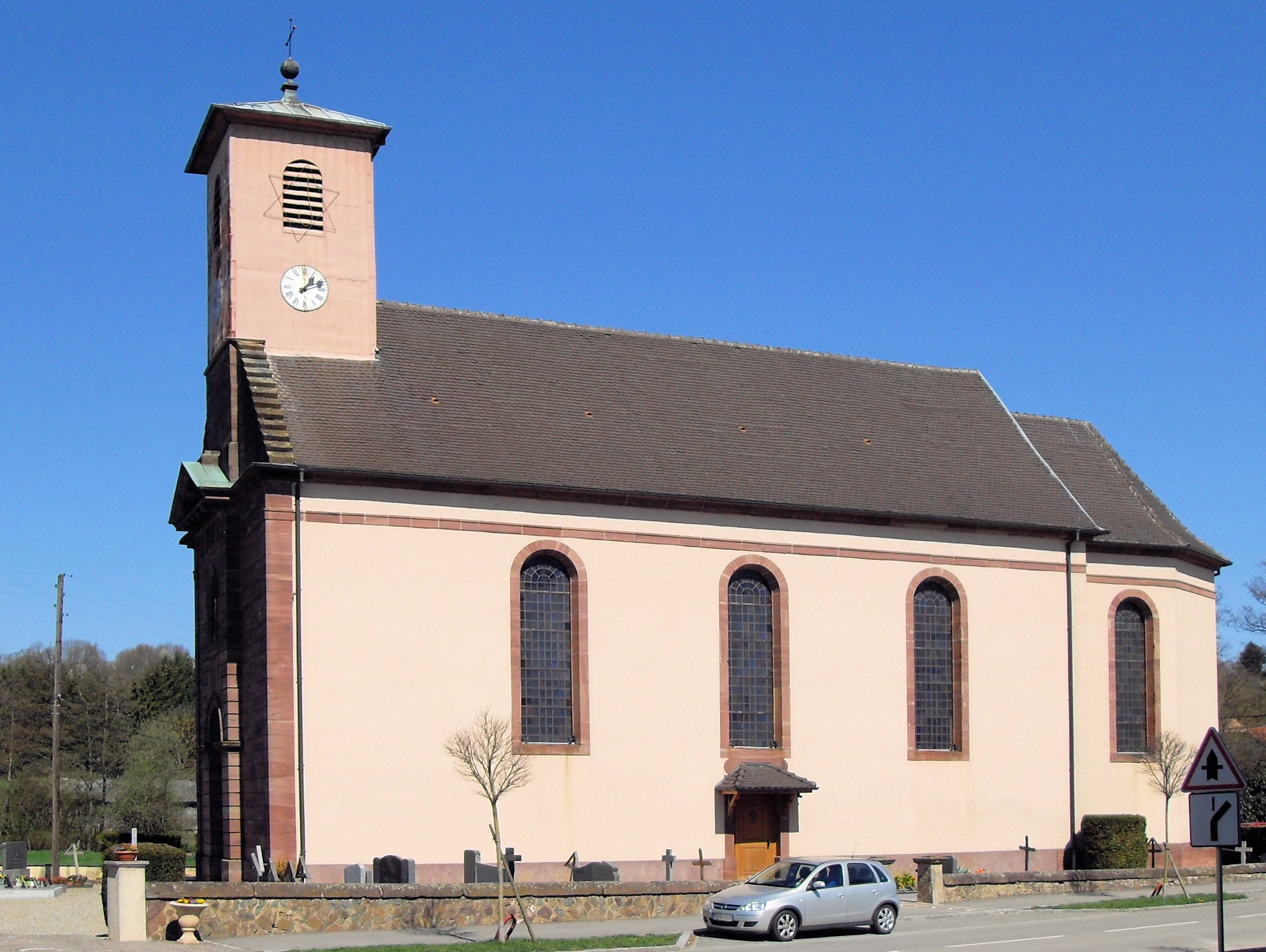 L'église Saint-Vincent à Soppe-le-Bas